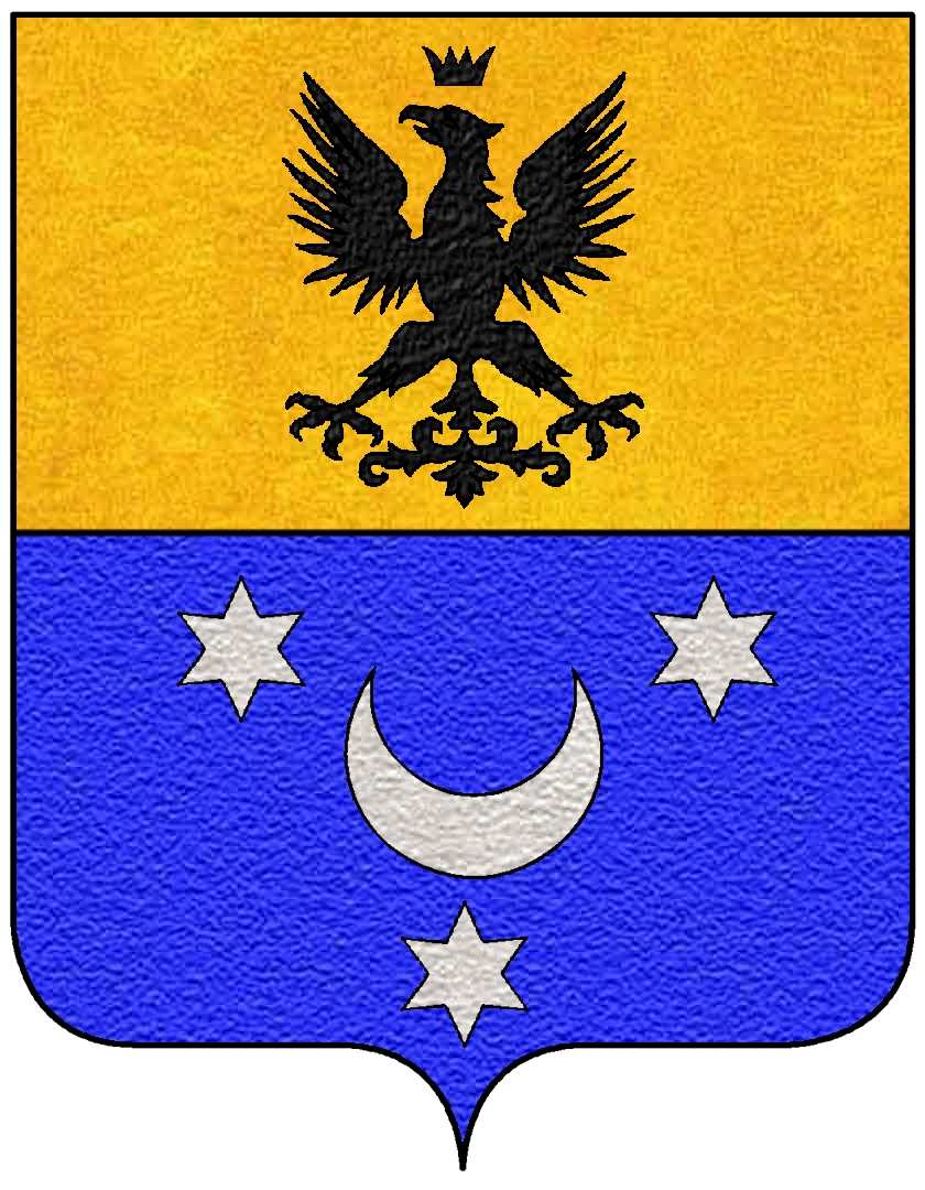 Stemma della famiglia Lantieri Paratico